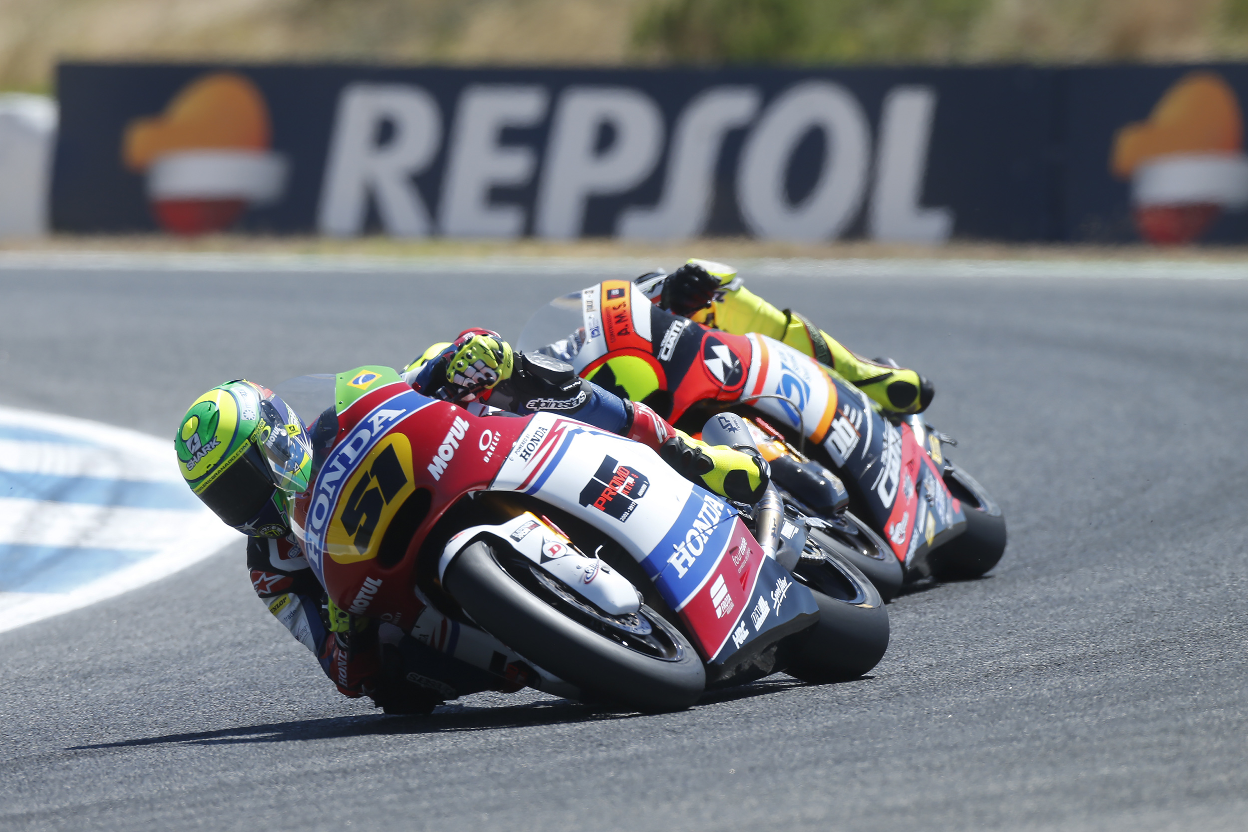 FIM CEV Repsol Estoril. Eric Granado